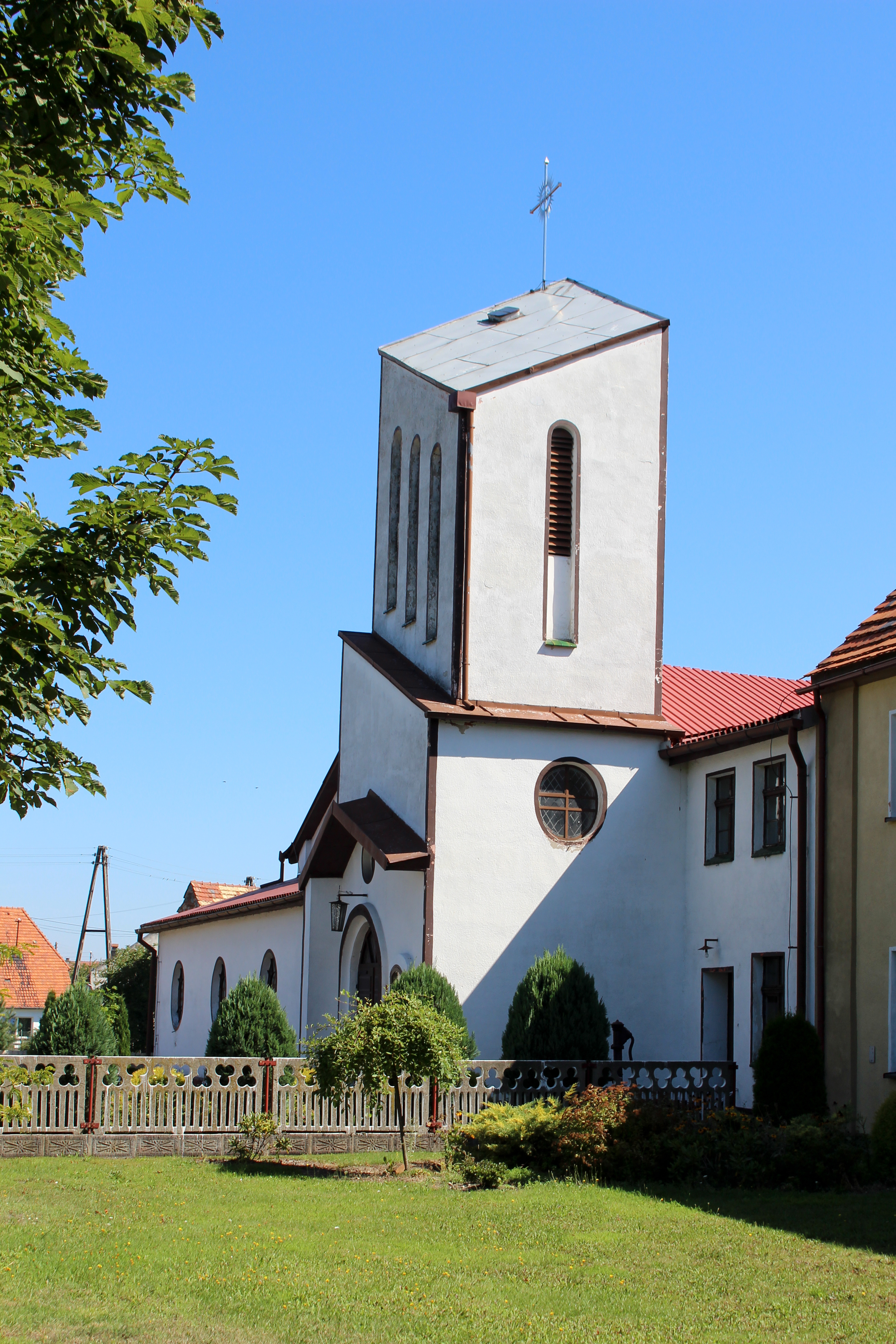 Sowin - rzymskokatolicki kościół filialny p.w. św. Floriana.